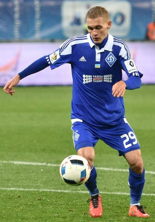 Віталій Буяльський - футболіст Динамо (Київ)